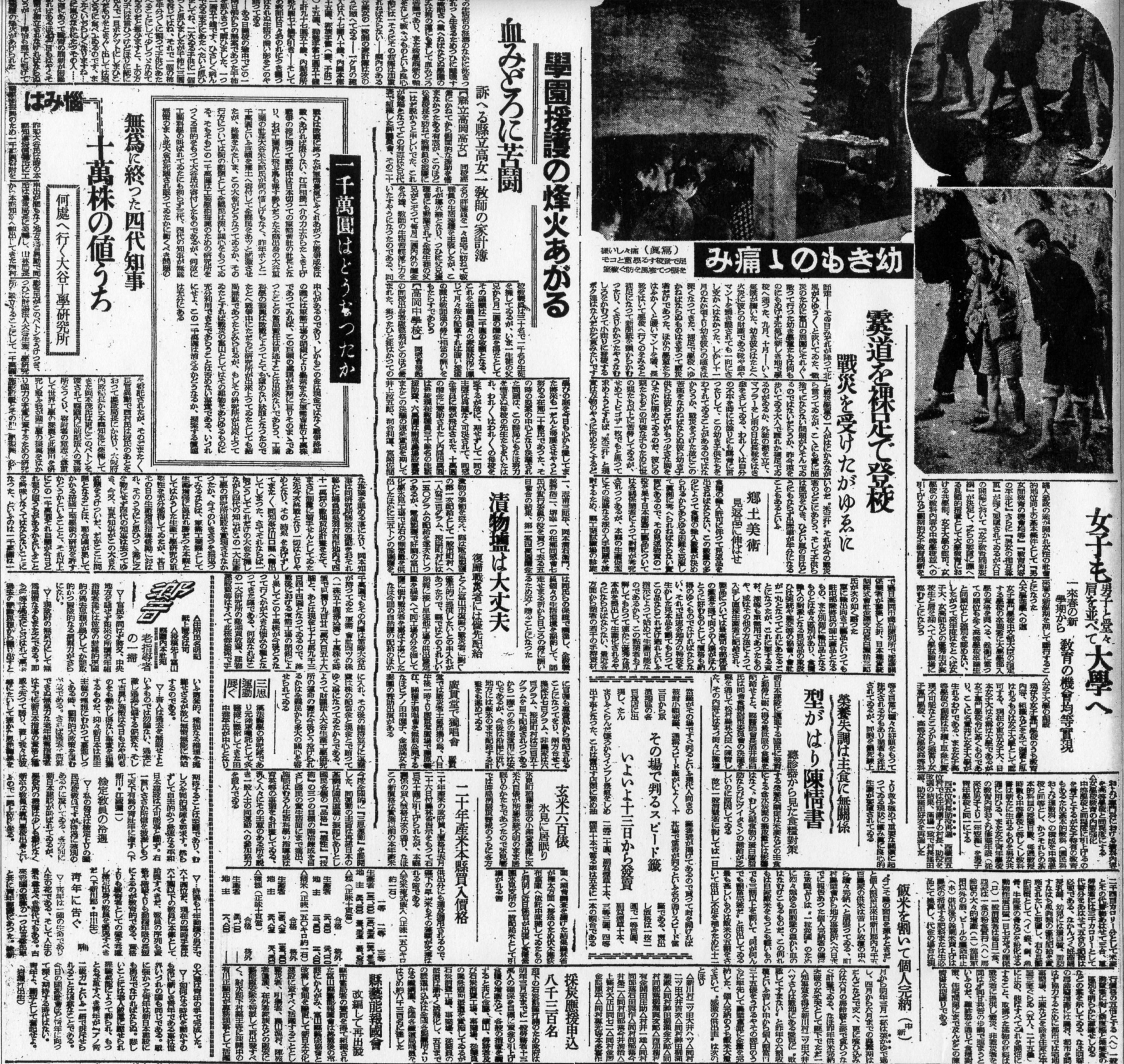 罹災児童の迎えた冬